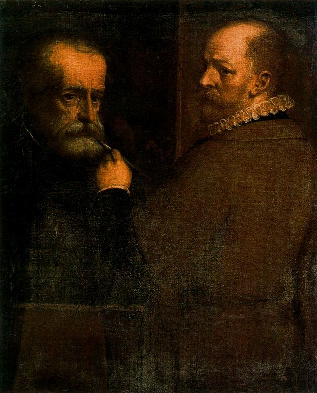 Luca Cambiaso, autorretrato pintando a su padre, Corredor Vasariano